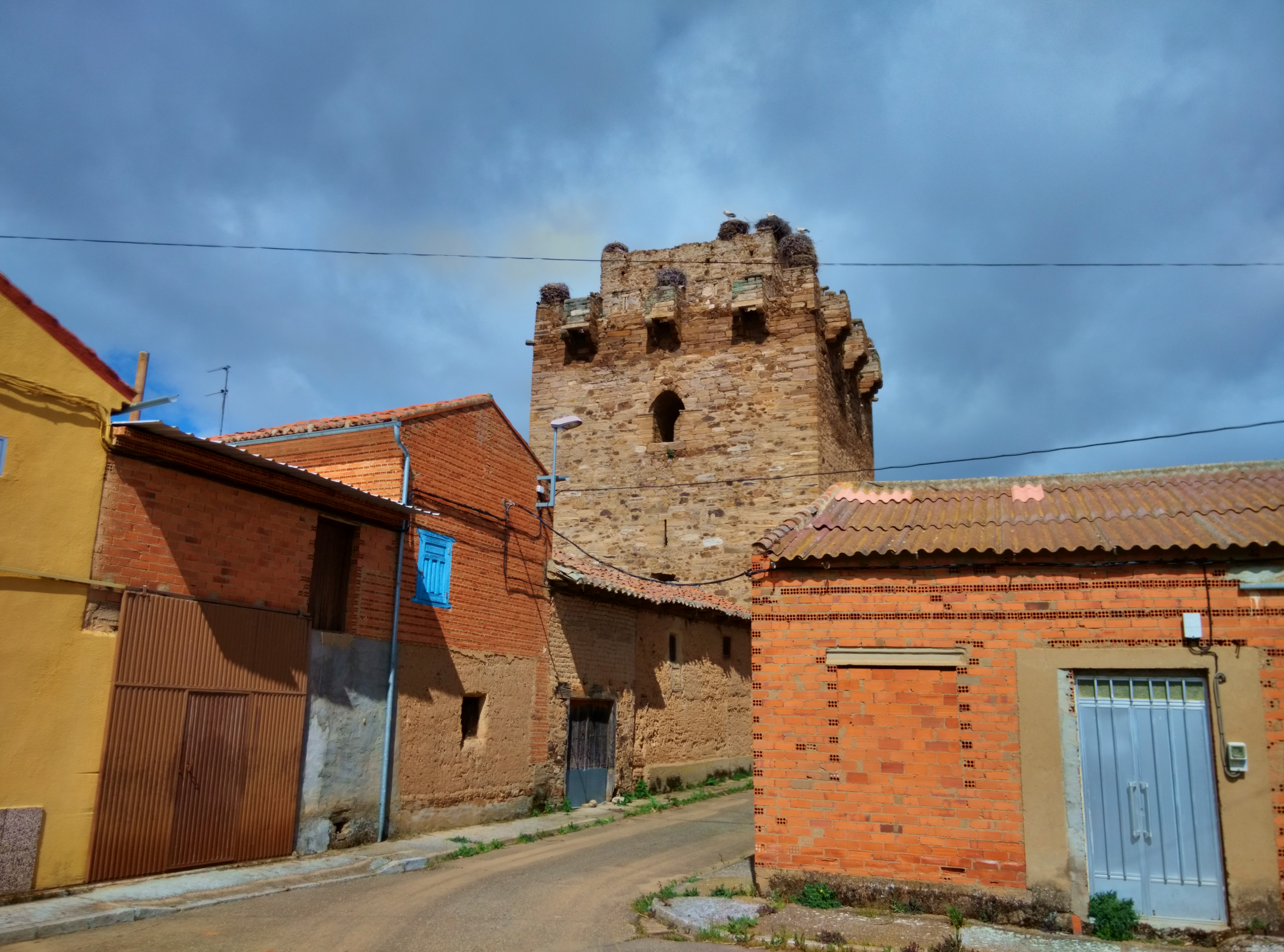 Torre del castillo de Quintana del Marco (León, España).